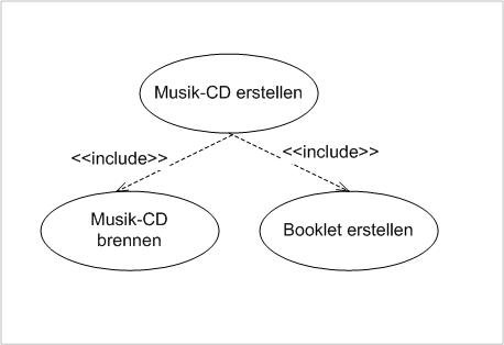 Anwendungsfall (UML2) - Beispiel 2